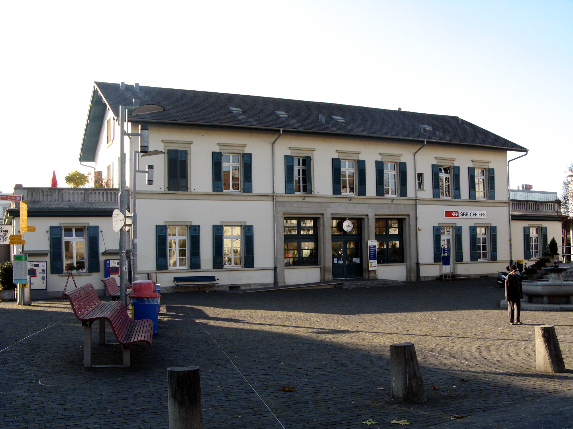 Bahnhof Zofingen